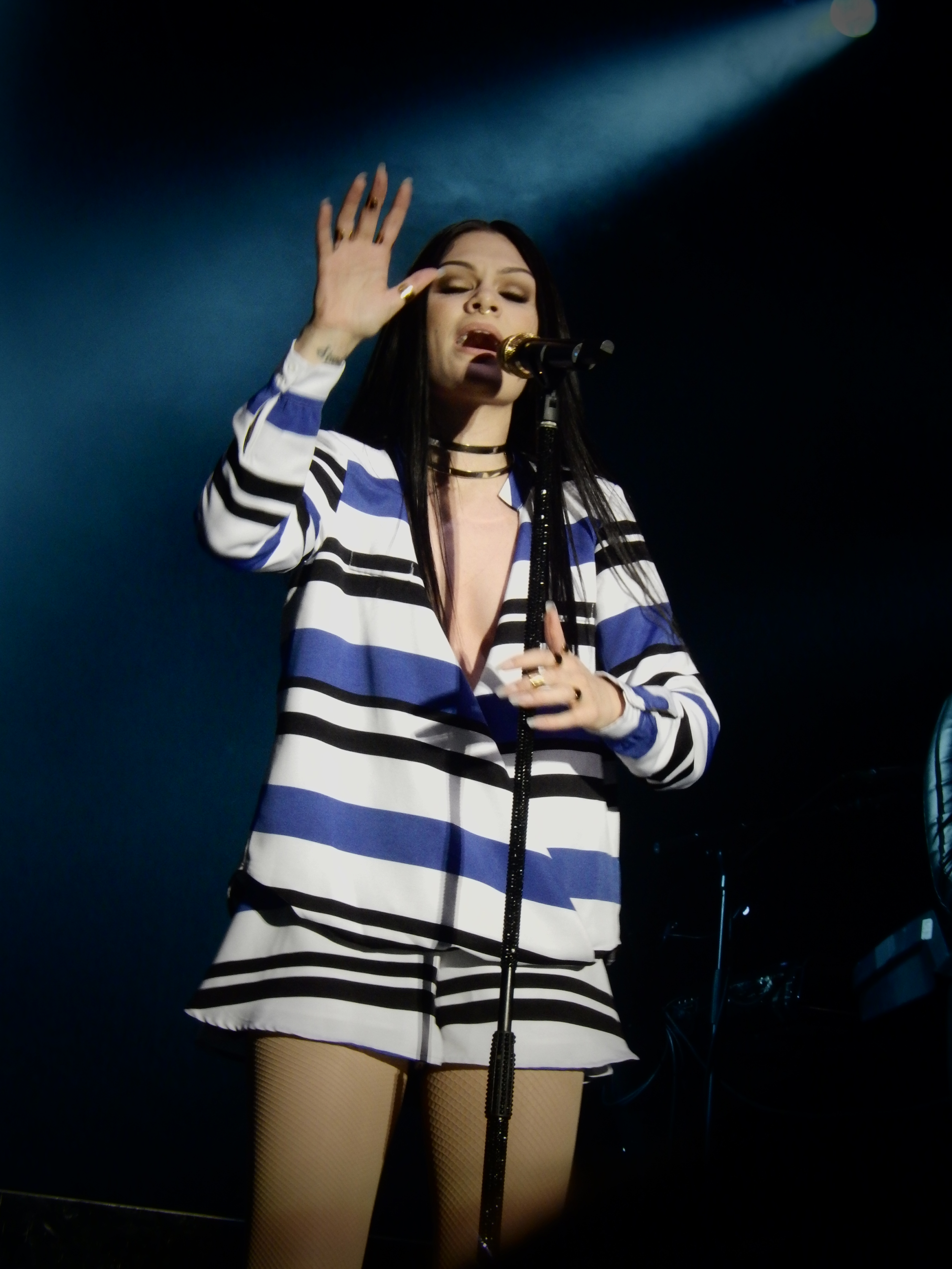 Jessie J, Somerset House, London